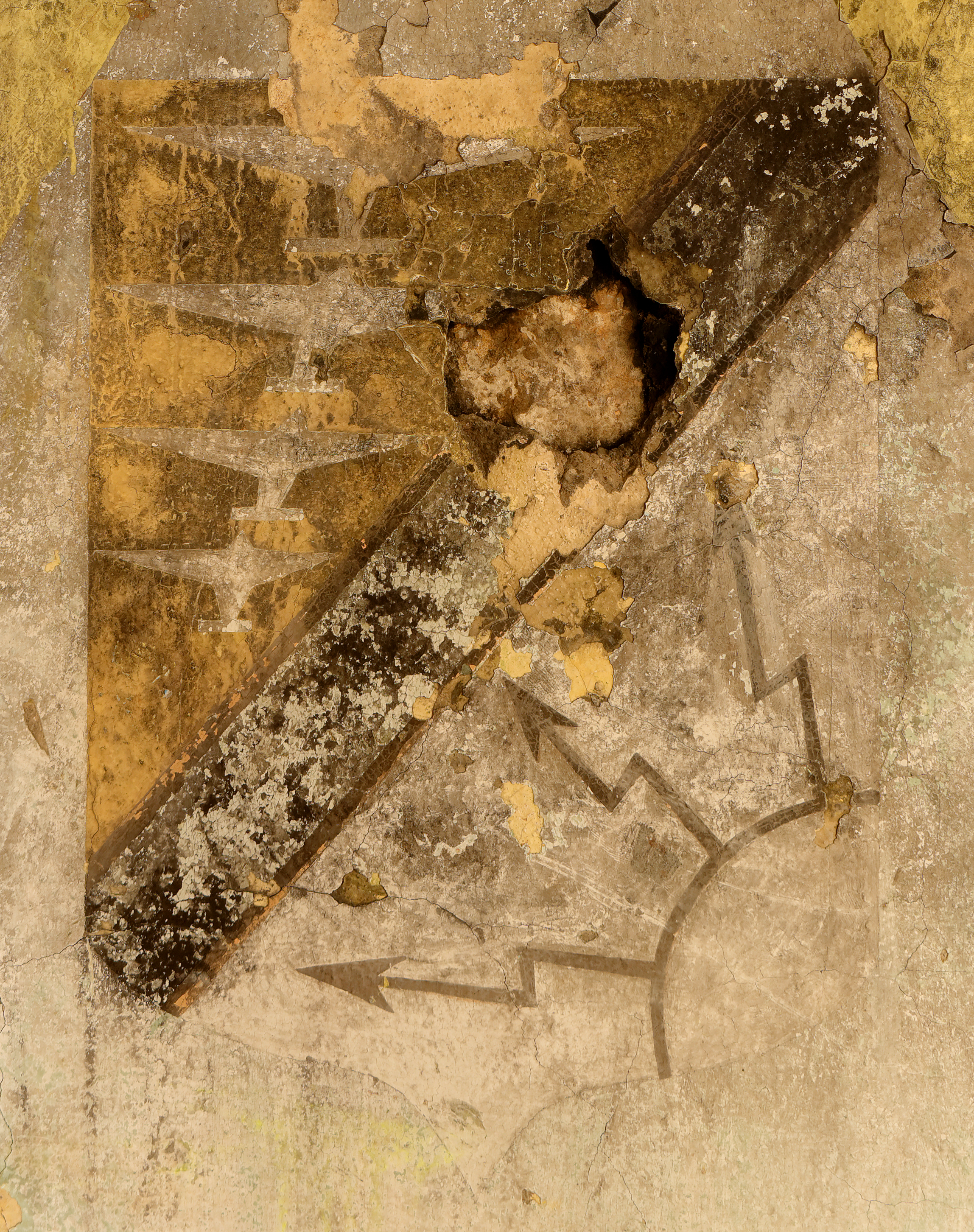 Fort du Salbert : Insigne de la SMR 60/921 (HDR). Définition héraldique : Taillé de jonquille à 4 avions blancs en perspective mouvant vers le chef et d'argent à 3 foudres d'or issant de la pointe senestre, à une barre de sable brochant sur la partition. Les 4 avions symbolisent la chasse aérienne tandis que les 3 éclairs symbolisent l'utilisation des ondes électromagnétiques comme outil de détection aérienne.